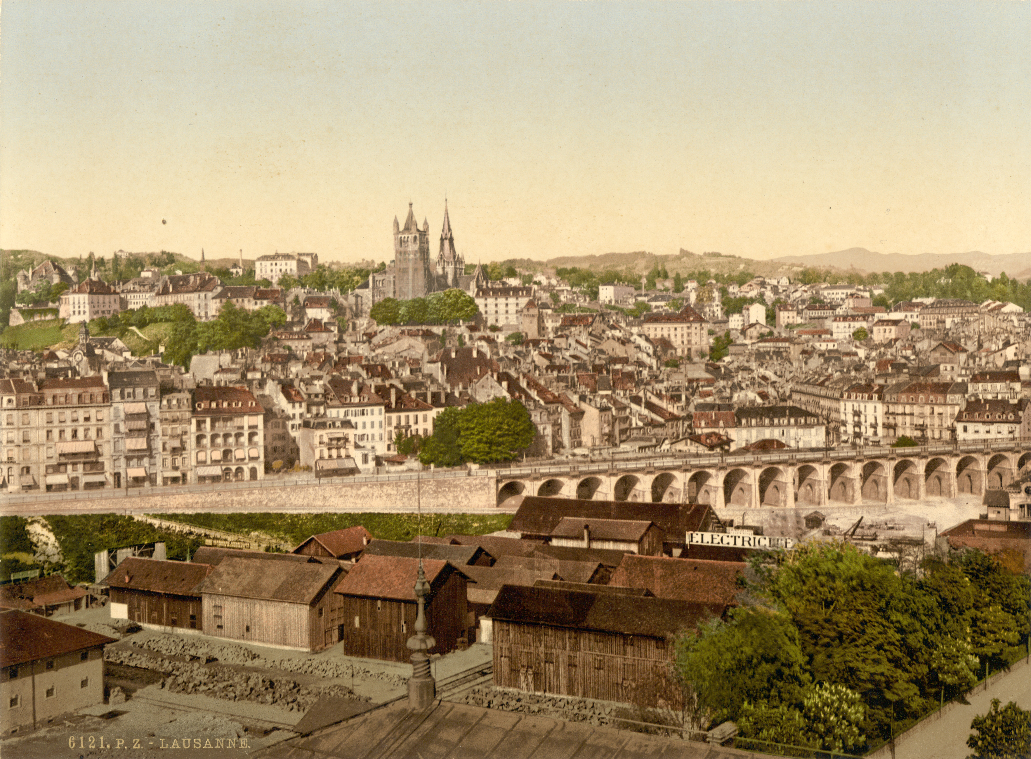 View of Lausanne (Switzerland).